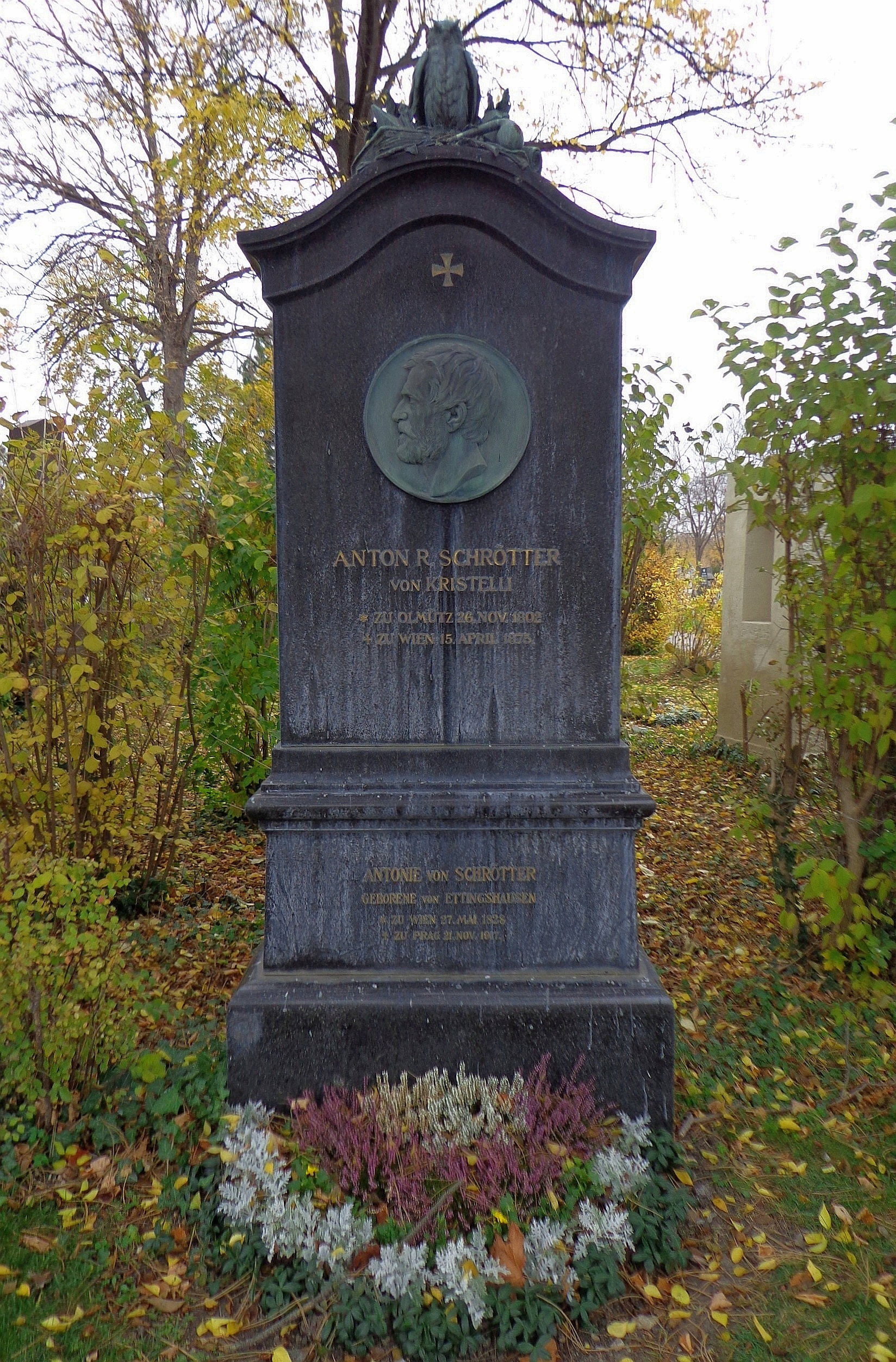 Wiener Zentralfriedhof - Ehrengrab von Anton Schrötter von Kristelli